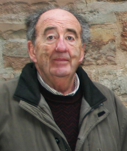 Eugenio Arraiza. 2008.